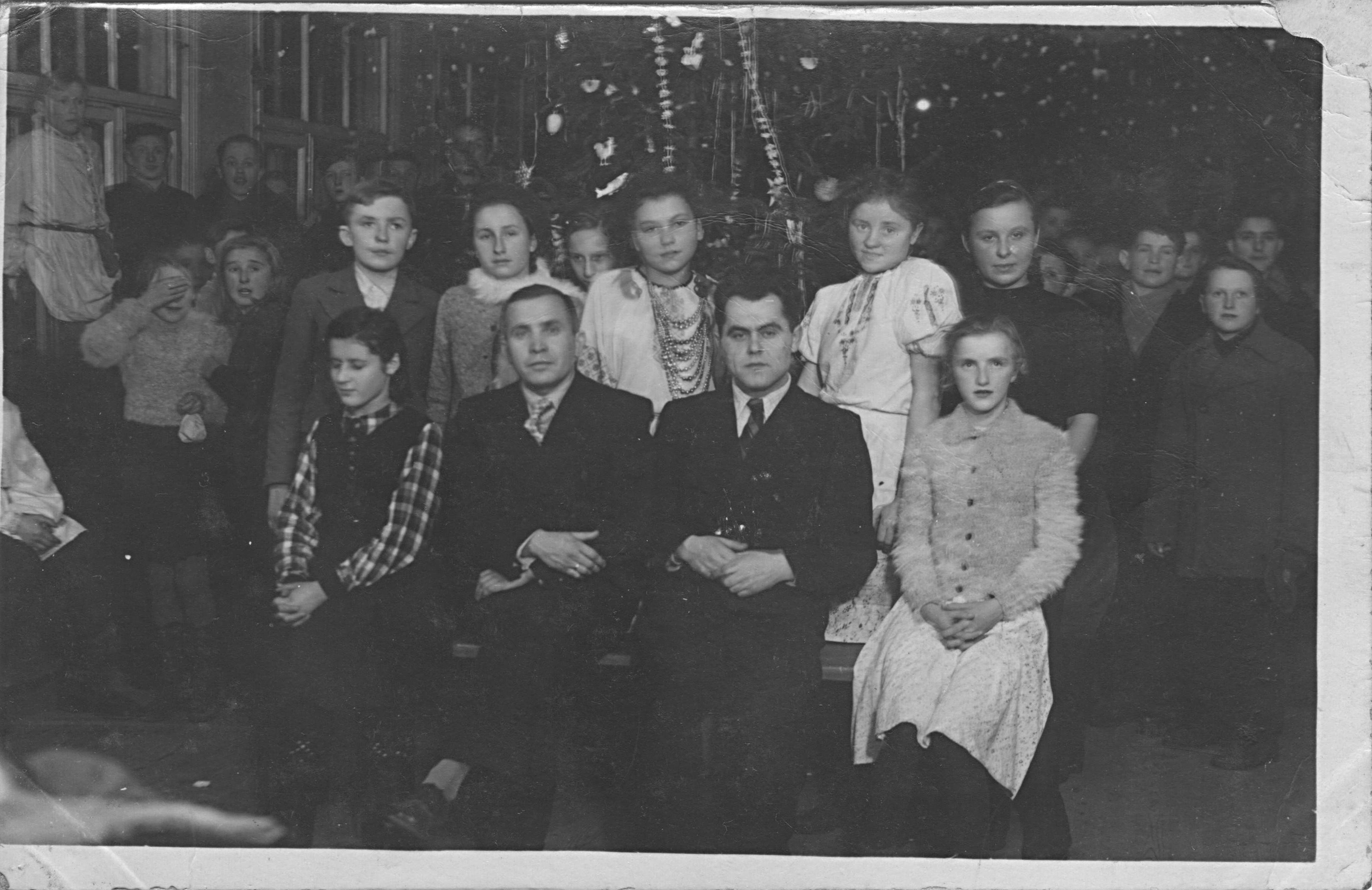 Беларуская (тарашкевіца): Сустрэча Новага 1944 року ў Беларускай народнай школе ў Пружане